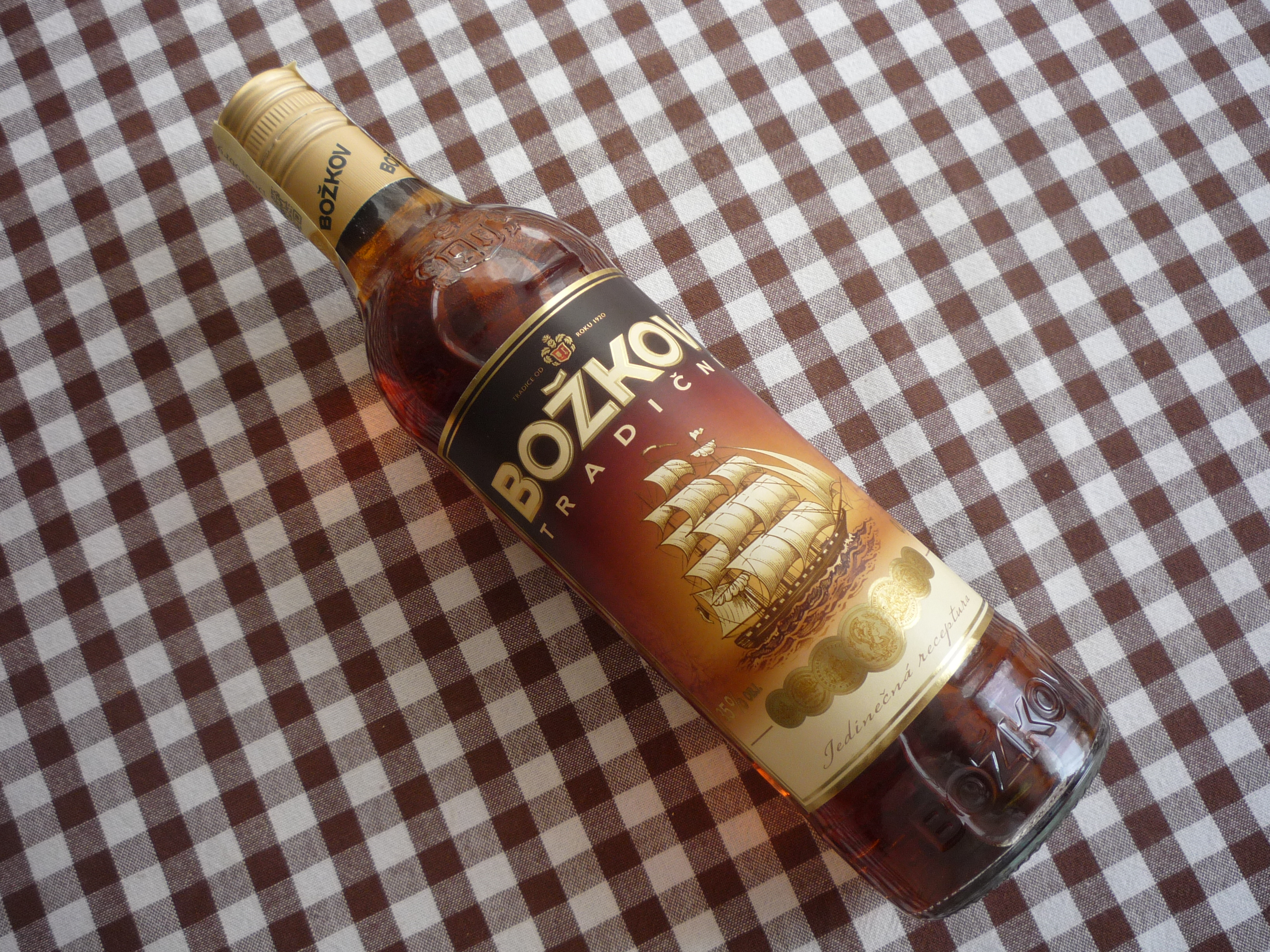 Božkov speciál mandlový (Czech Republic). Uznávaný tuzemský alkohol. Použití - vhodný na pečení cukroví. Grog (horký alkoholický nápoj). Fant za svatební výslužku. Je to dárek co žádného čecha neurazí. Tento alkoholický nápoj ztratil tradiční název RUM. Czech Republic.